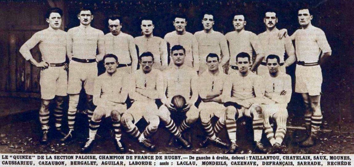 La section paloise victorieuse du championnat de France de rugby en 1928.